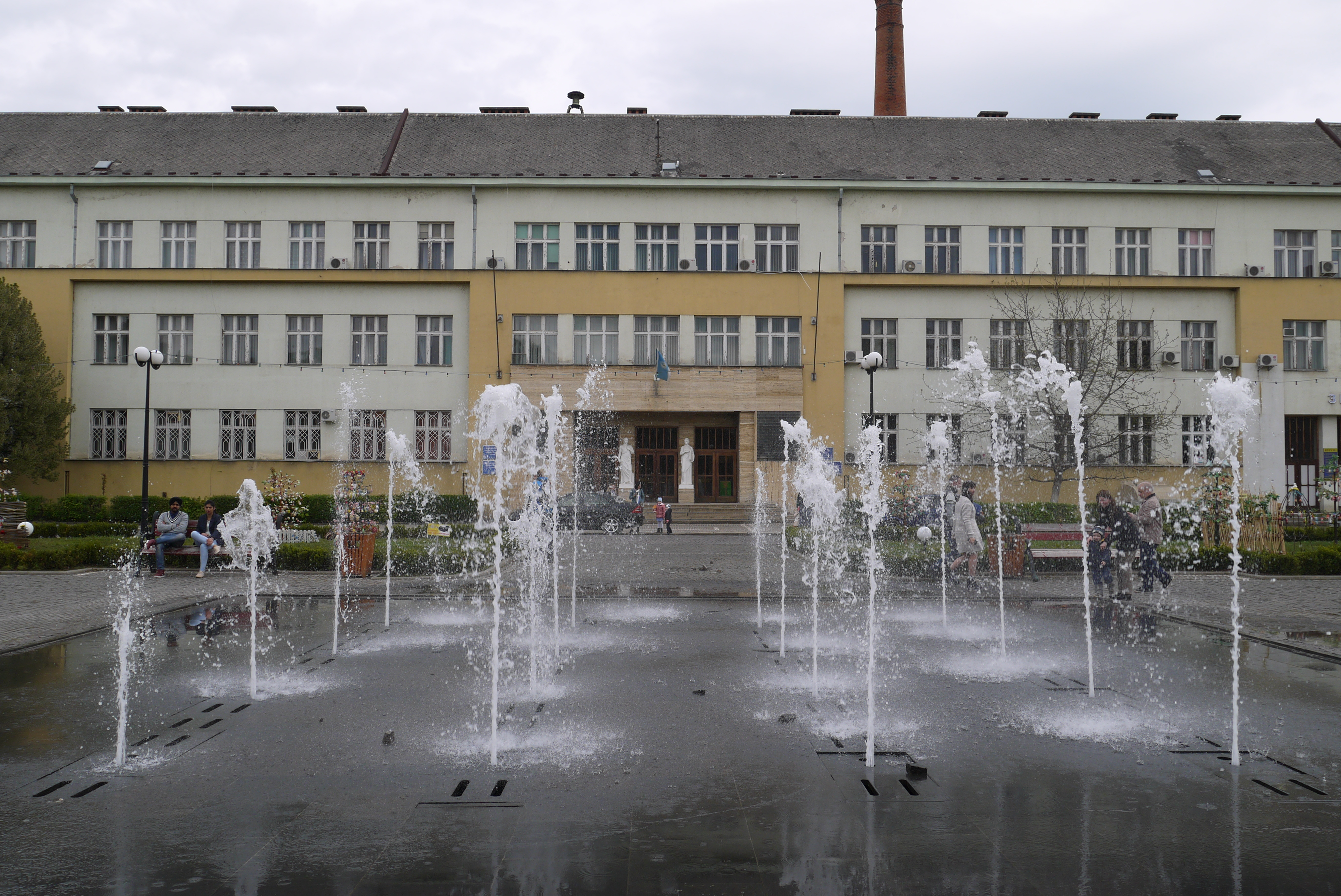 Будинок колишнього суду (профспілки), Ужгород, пл. Народна, 5